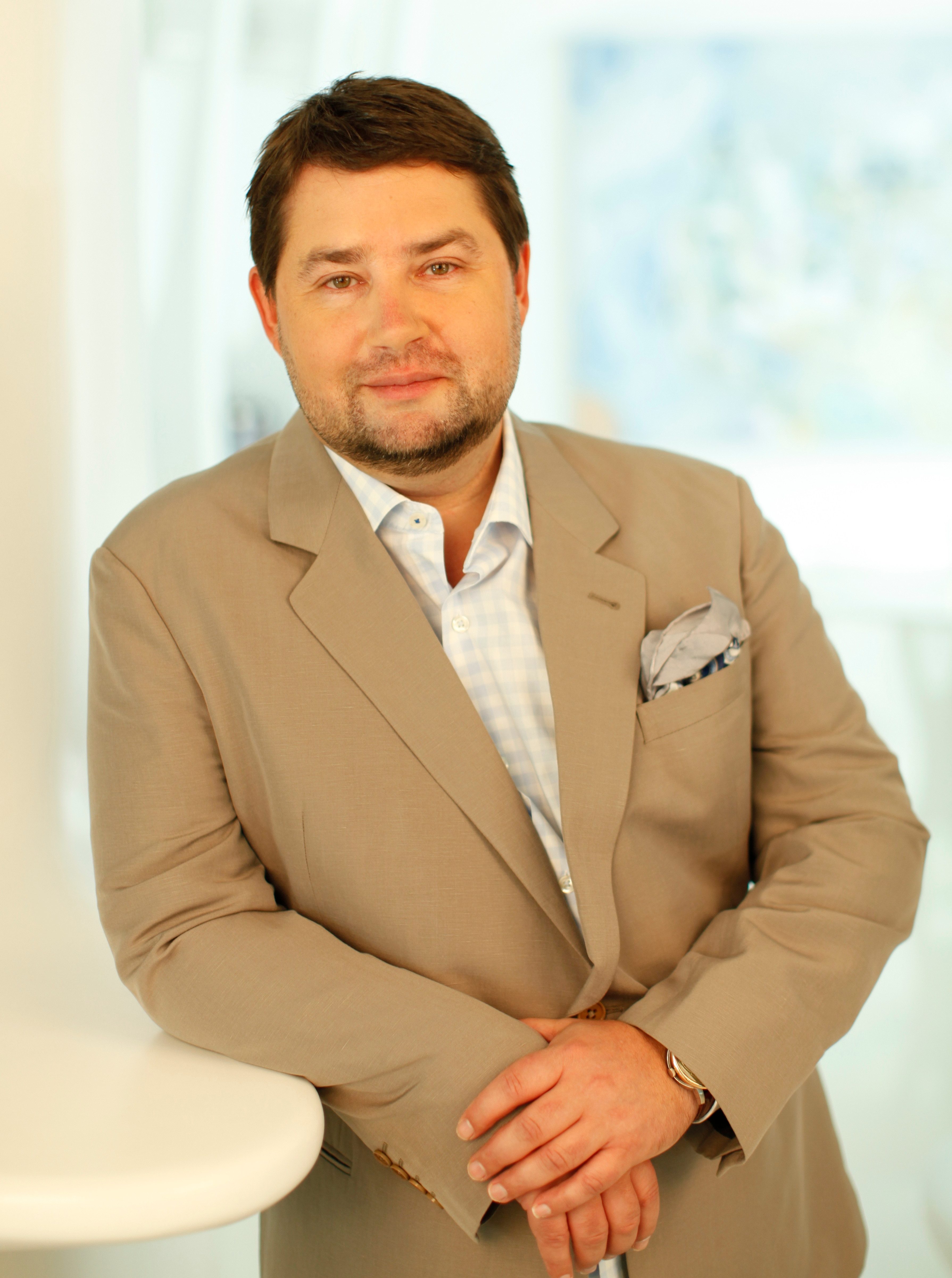 Игорь Никитин